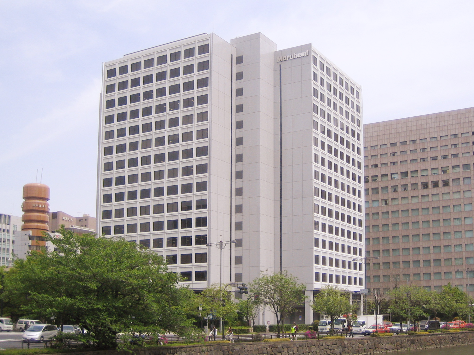 Marubeni Corporation (丸紅株式会社), in Chiyoda, Tokyo, Japan